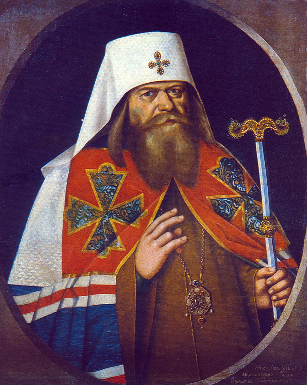 Патриарх Адриан. Парсуна начала 18 в